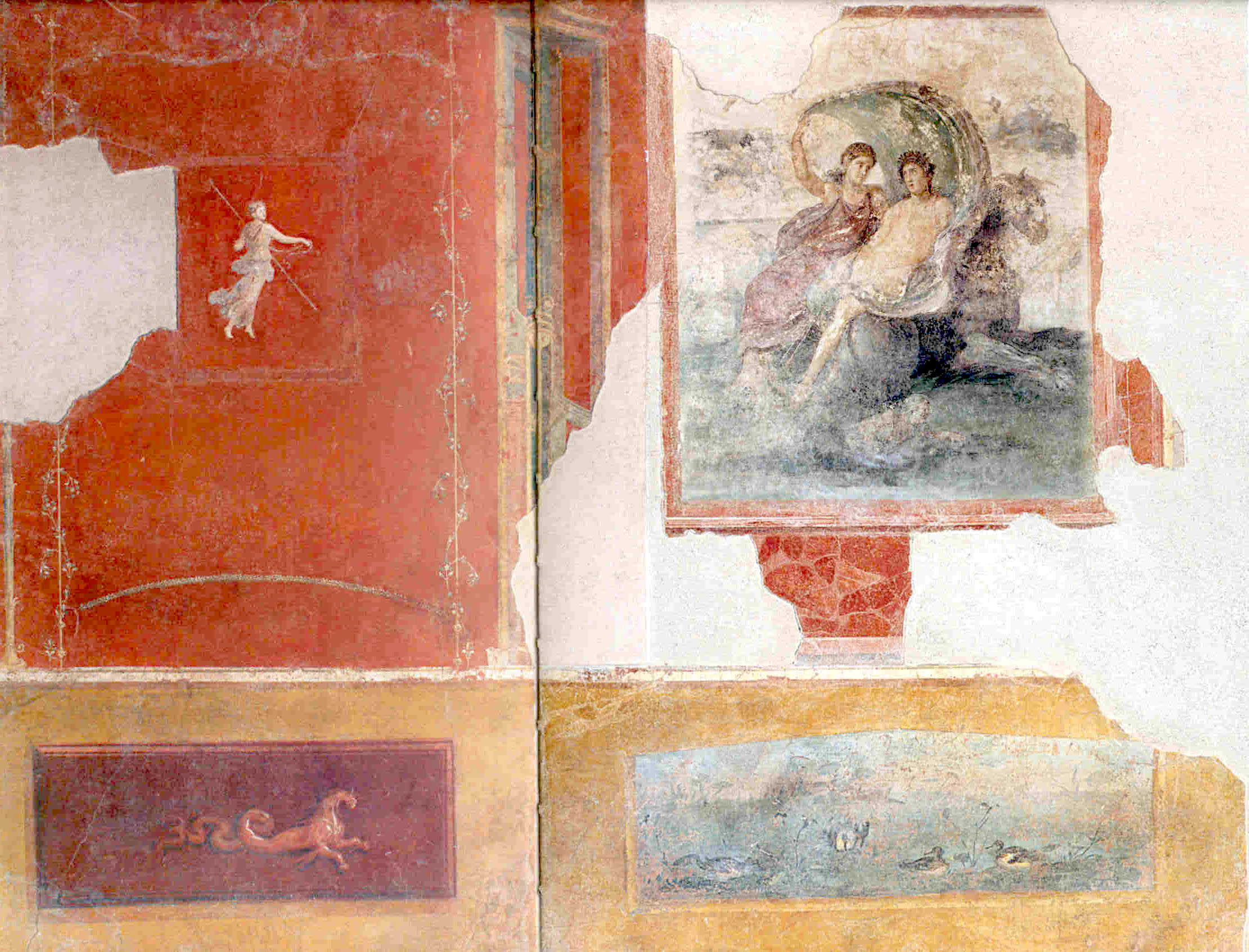 Affresco di Bacco e Cerere, proveniente da Villa Carmiano, conservato all'Antiquarium stabiano